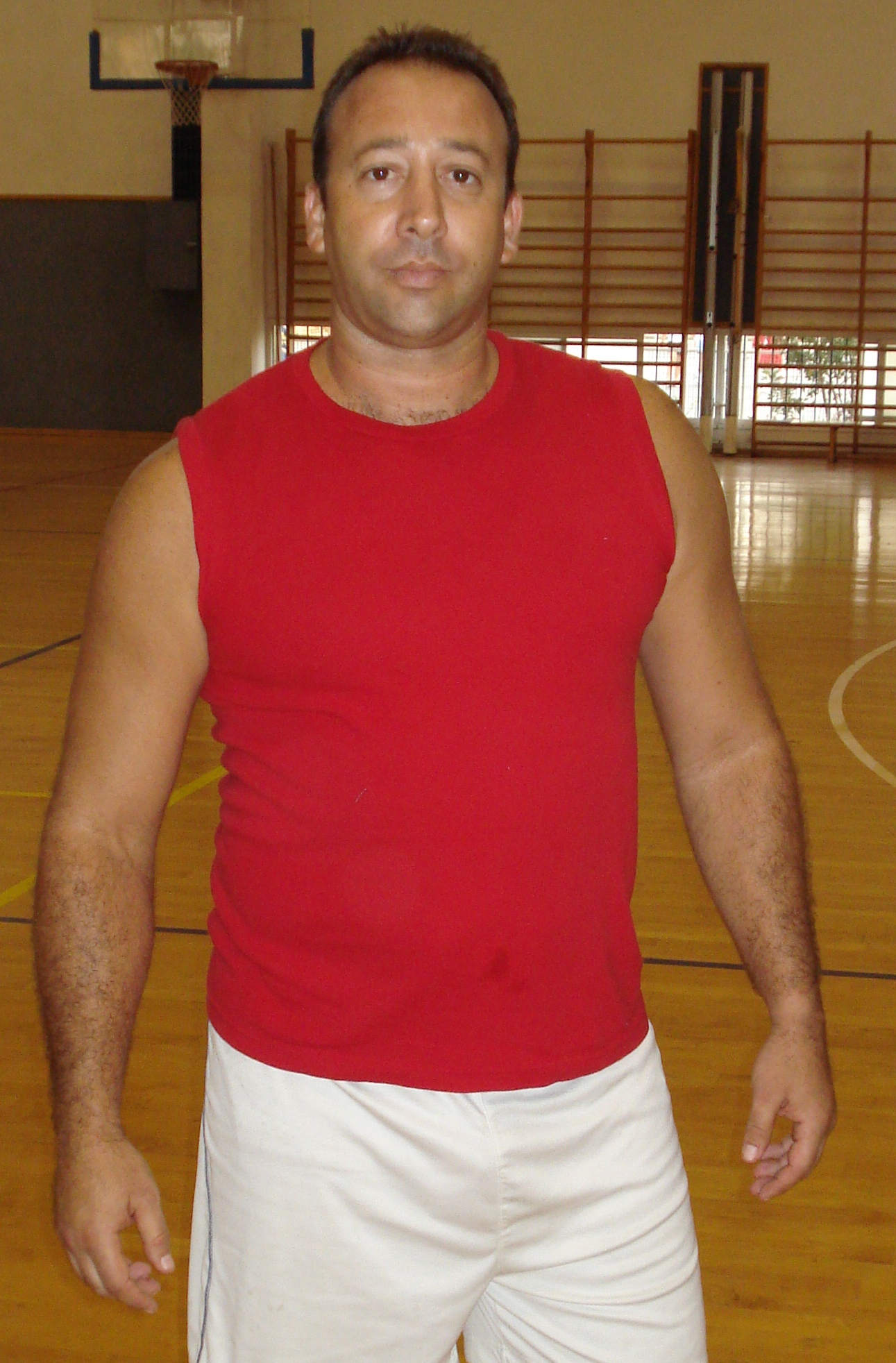 שלומי לוי, מאמן הקרייתים לשעבר